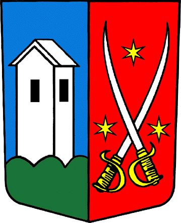 Gemeindewappen Niedergesteln